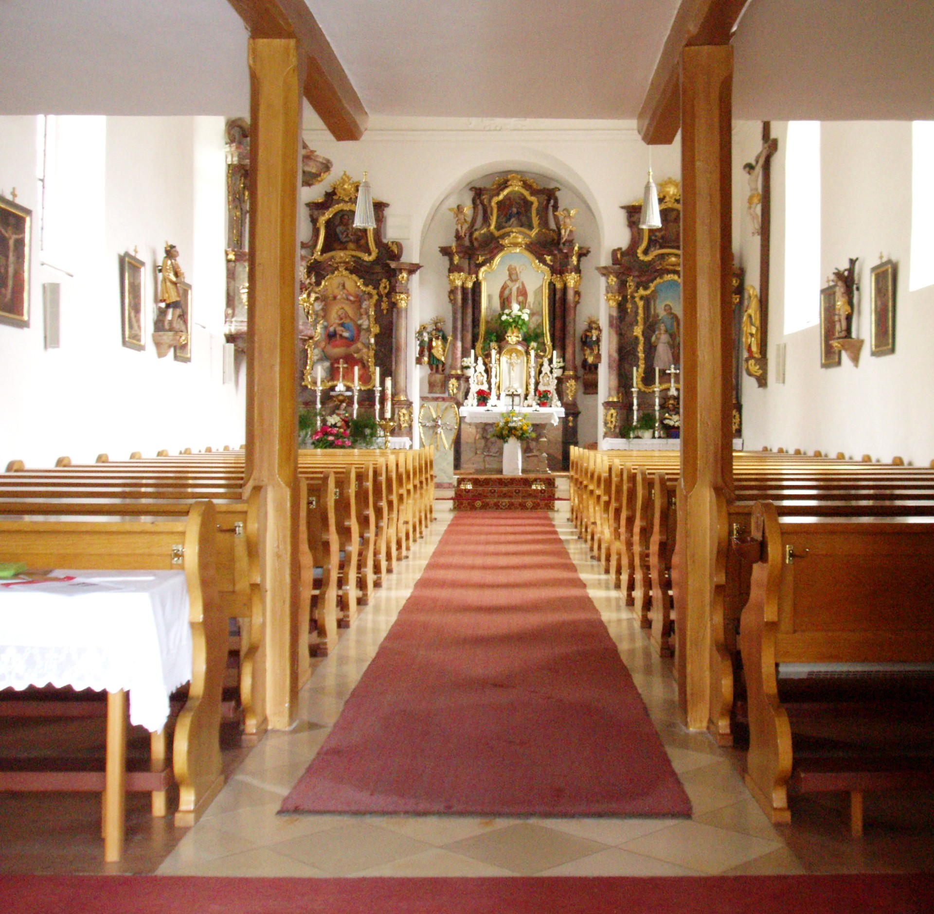 Kirche_St._Martin_in_Lobsing,_Landkreis_Eichstätt,_Rokokoausstattung